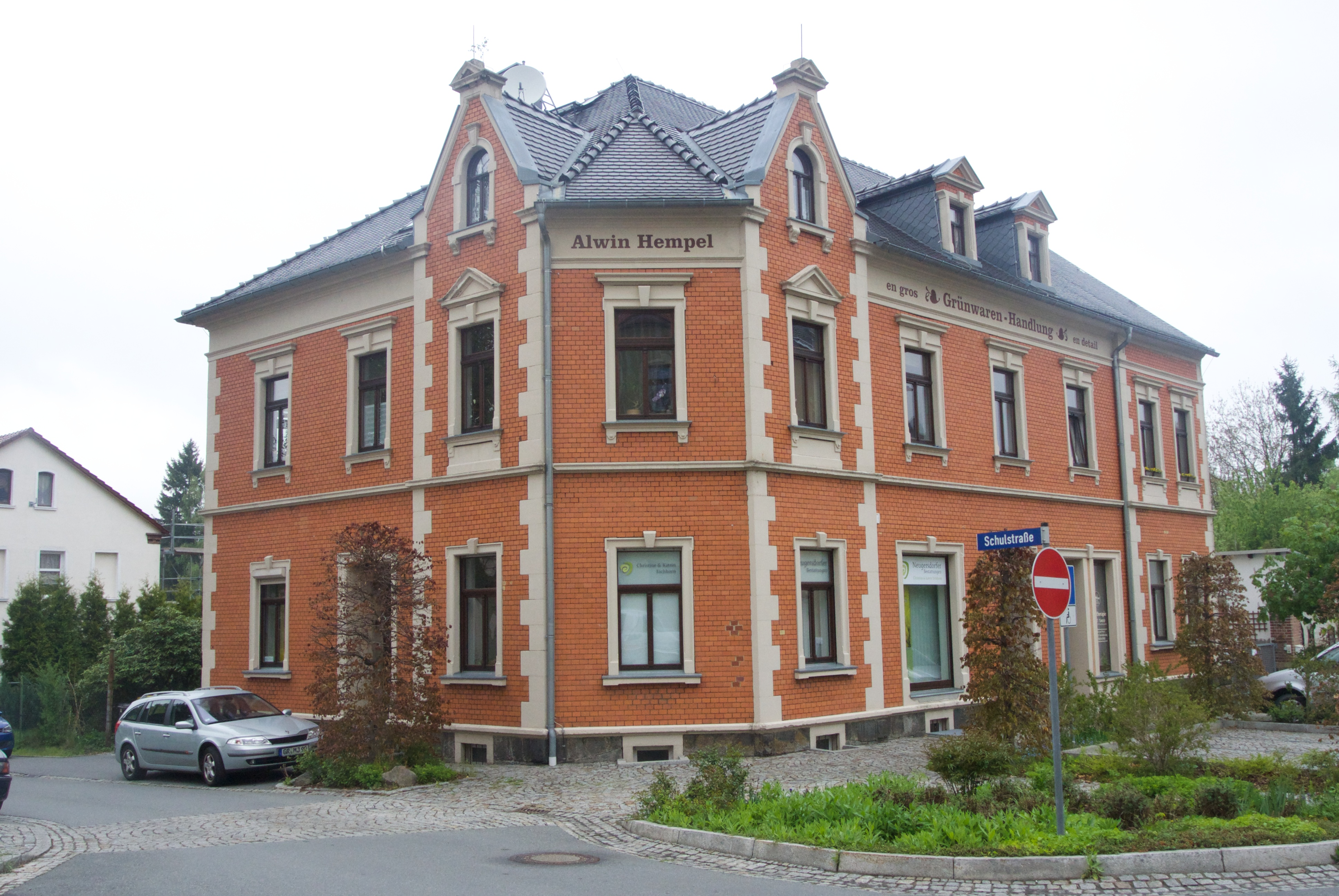 Ebersbach (Sachsen), Schulstraße 4